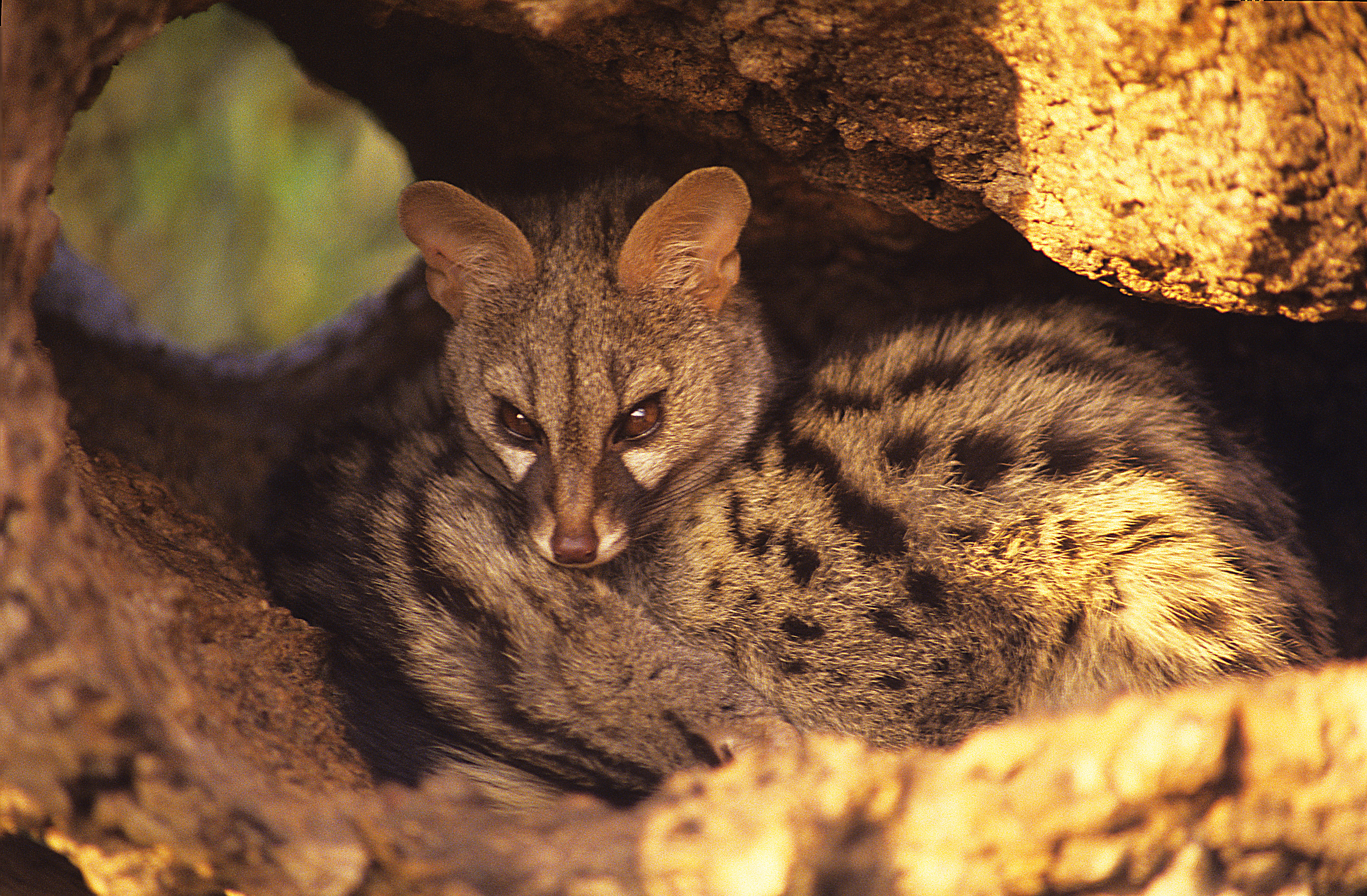 Gineta